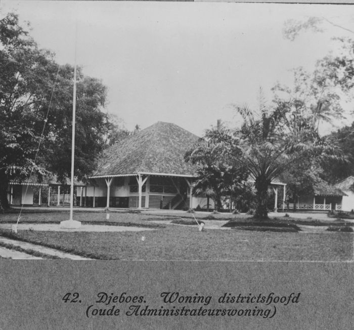 foto. Woning districtshoofd in Djeboes